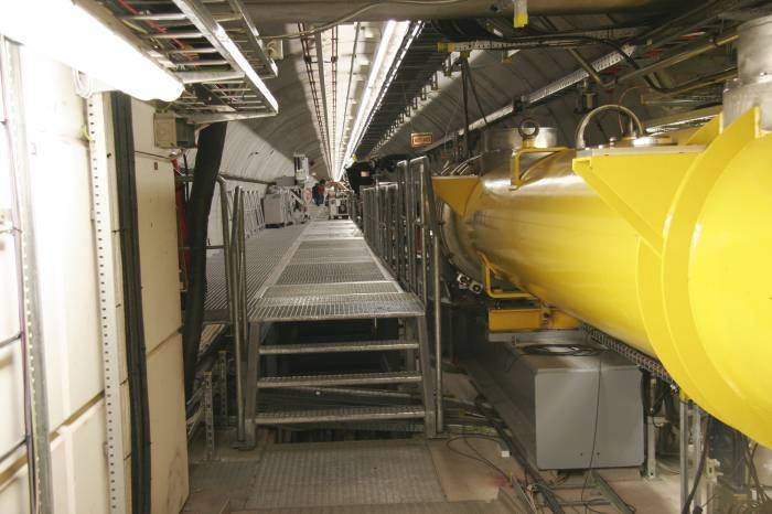 Tunnel vom Freie Elektronen Laser FLASH am DESY in Hamburg; der erste Abschnitt des Tunnels geht an dieser Stelle in einen Original-Tunnelnachbau über. Veröffentlichung mit freundlicher Genehmigung DESY, Hamburg.